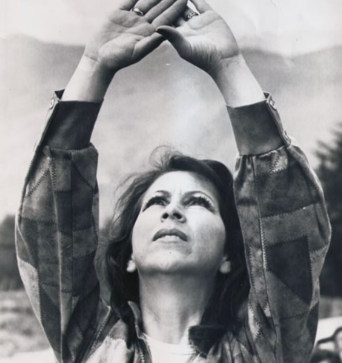 REGINA 11 EN GUATAVITA